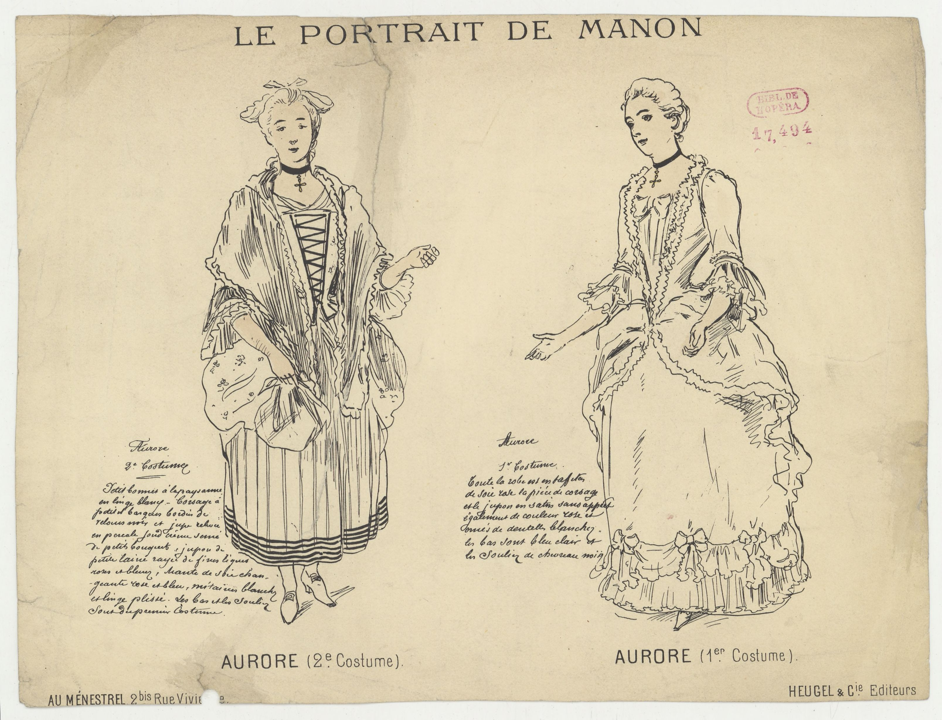 Costumes for Aurore in Jules Massenet's Le portrait de Manon, the sequel to his more famous Manon.